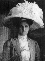 Marie Kyzlinková (1889 - 1969), Česká spisovatelka.